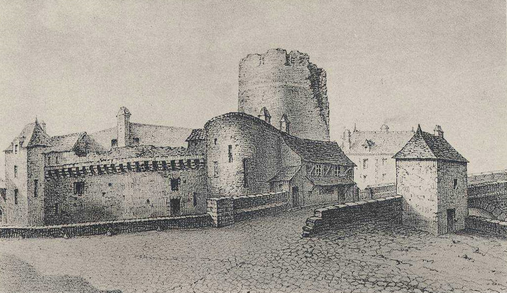 Gravure représentant les vestiges vers 1830 du château de Pirmil à Nantes, Loire-Atlantique, France